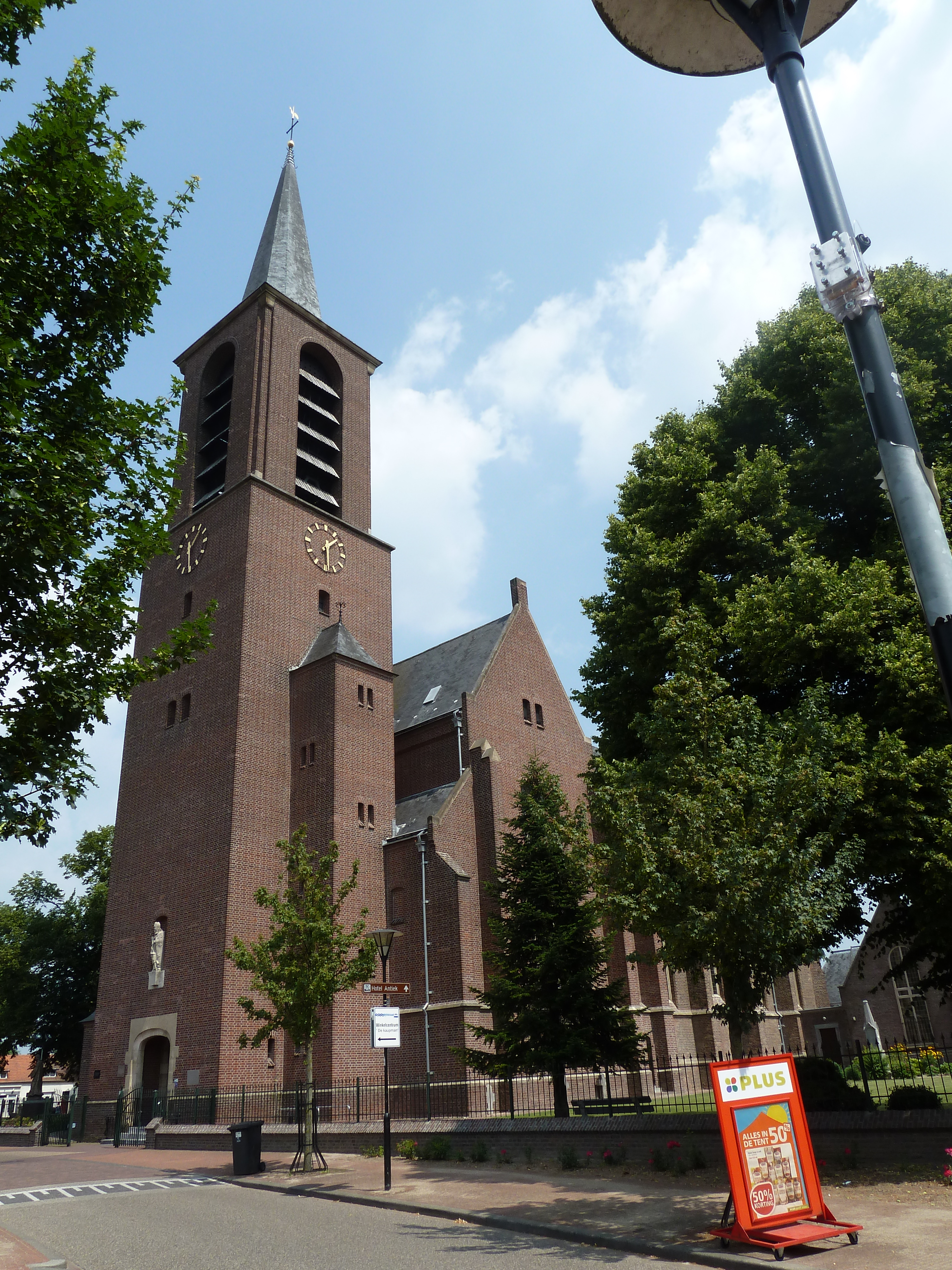 Sint-Lambertuskerk, Helden, Nederland